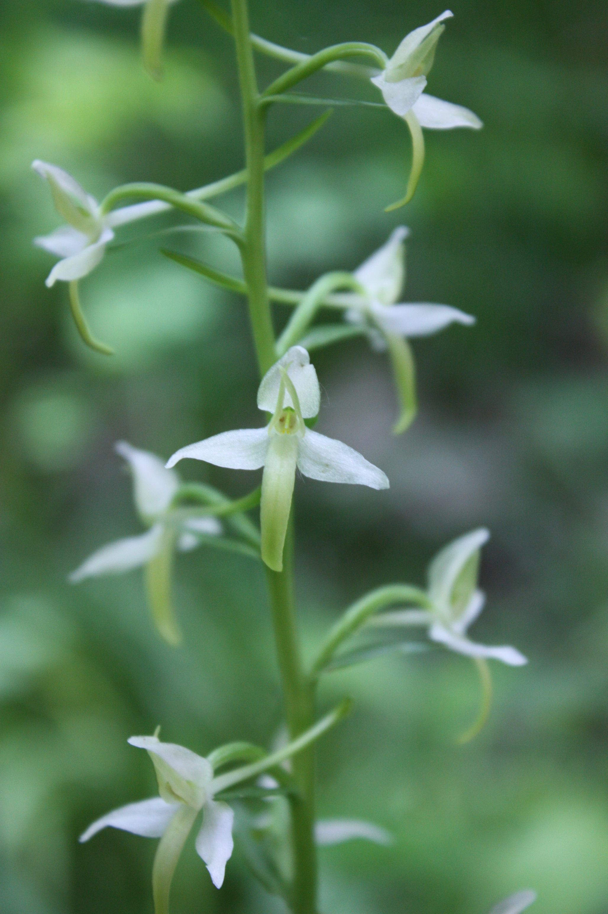 «Кармелюкове Поділля», Чечельницький район Бондурівська, Бритавська, Вербська, Демівська, Куренівська, Любомирська, Лузька, Стратіївська, Тартацька, Червоногреблянська сільські ради Чечельницької селищної ради Чечельницького району Тростянецький район с. Торканівка